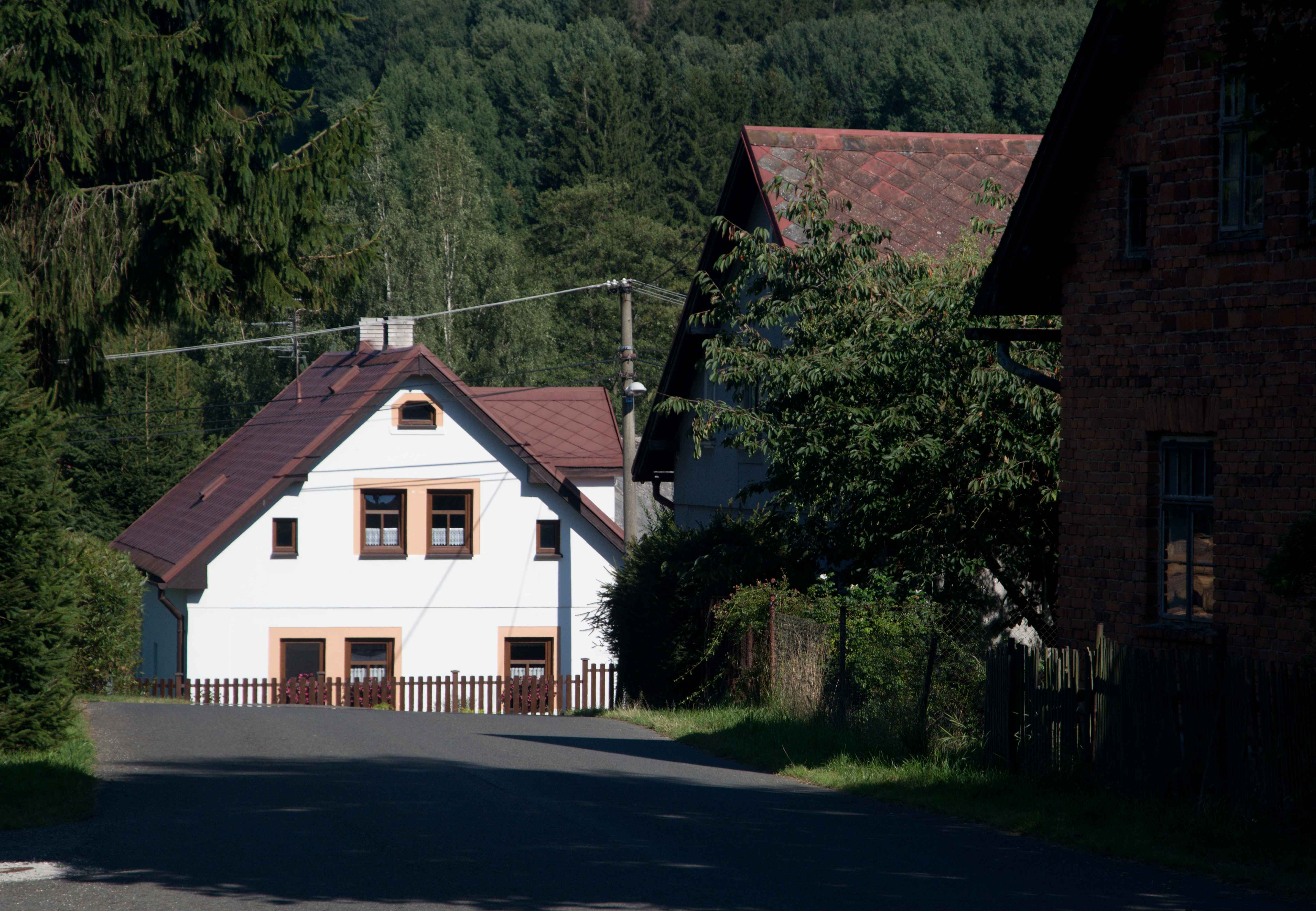 Labuť